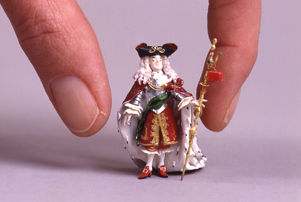 Die Figuren in Rococo en miniature wurden im Maßstab von 1:50 erstellt.